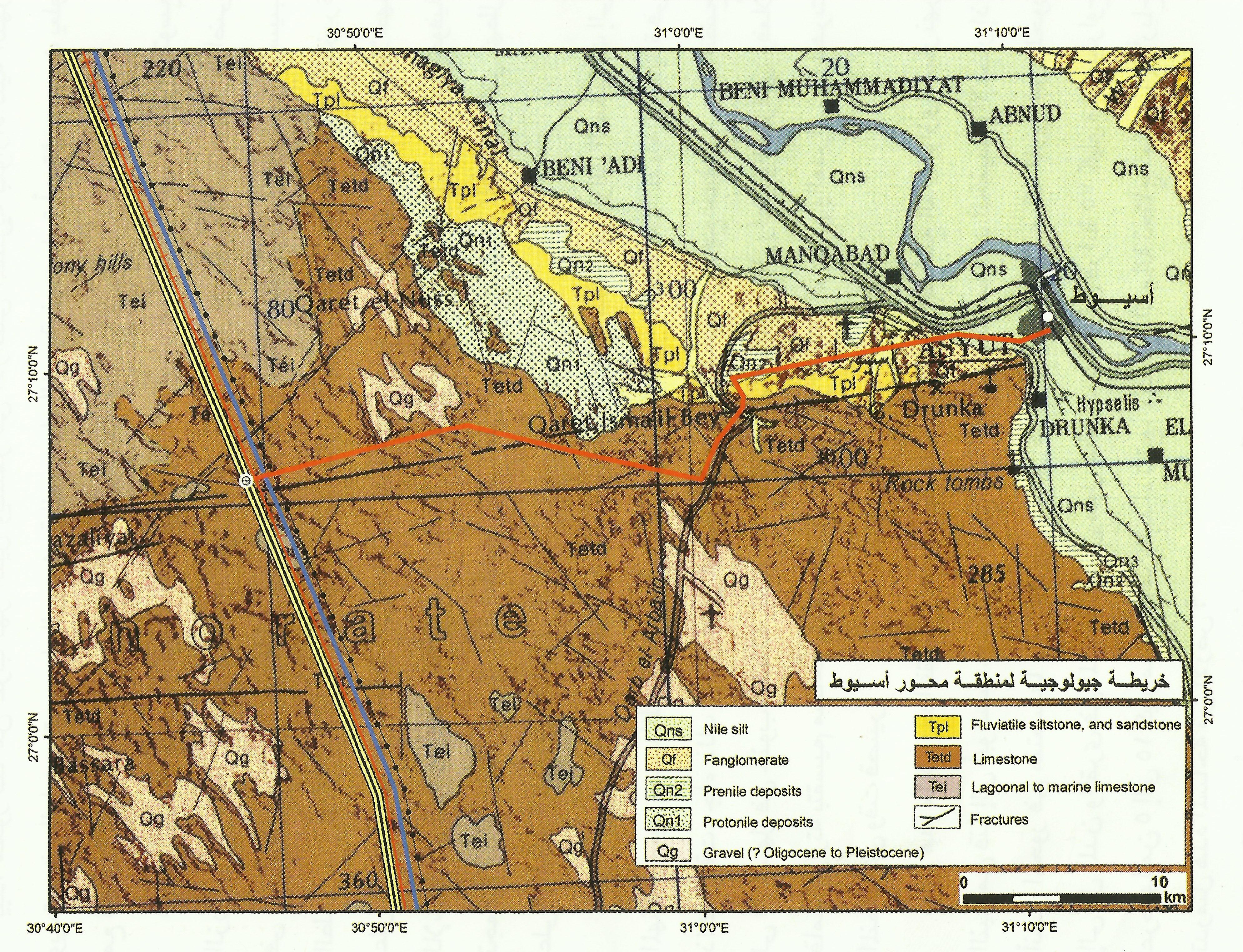 محور تعمير أسيوط